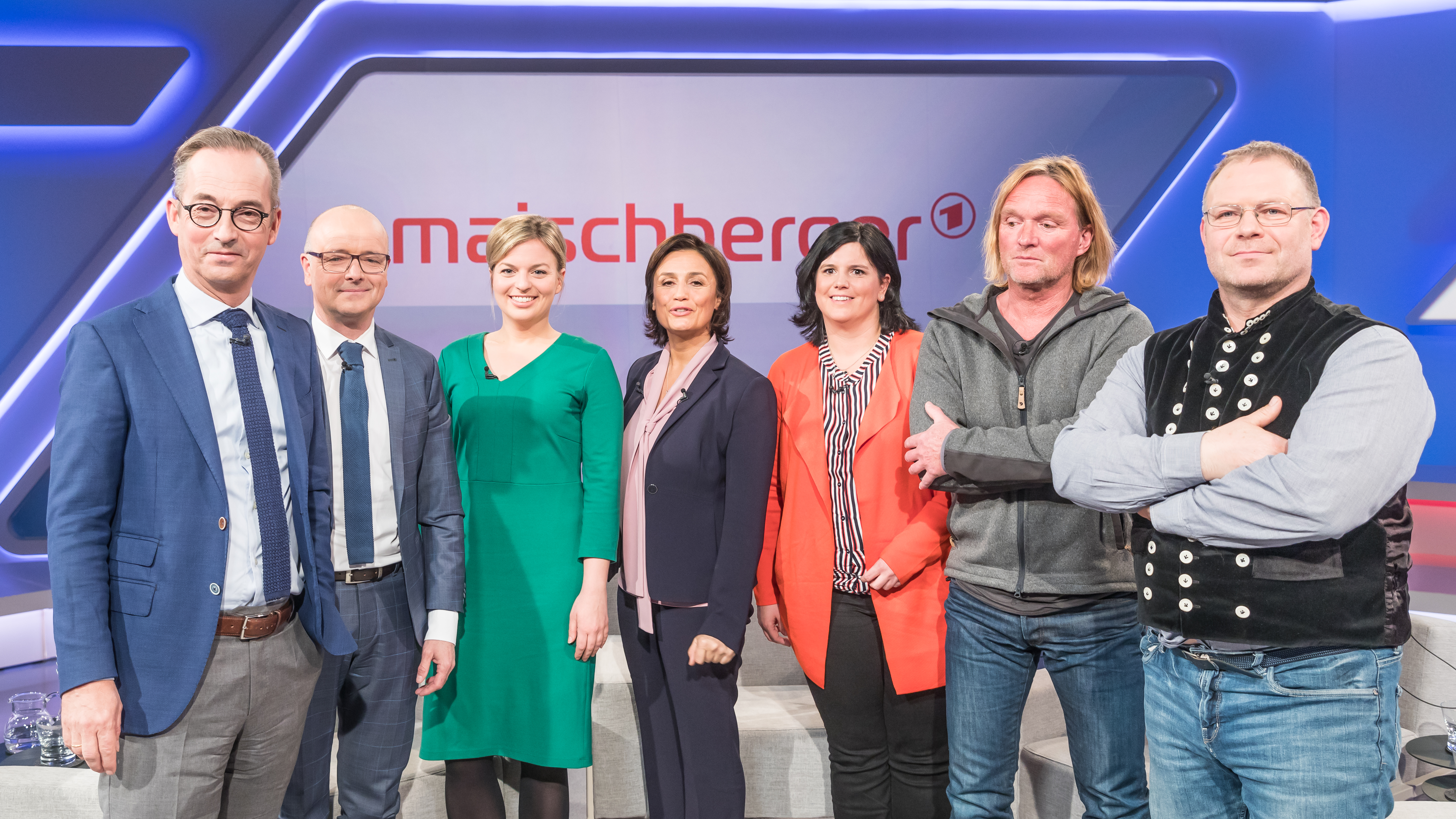 MAISCHBERGER am 27. Februar 2019 in Köln. Produziert vom WDR. Thema der Sendung: „Rettet die Biene, schützt den Wolf: Was ist uns der Naturschutz wert?“ Gruppenfoto nach der Sendung: Jan Fleischhauer, „Spiegel“-Autor Karsten Schwanke, Wissenschaftsjournalist und Meteorologe Katharina Schulze, B’90/Grüne, Fraktionsvorsitzende Bayern Sandra Maischberger, Moderatorin der Sendung Carina Konrad, FDP, Bundestagsabgeordnete und Landwirtin Andreas Kieling, Tierfilmer Ronald Rocher, Schäfer